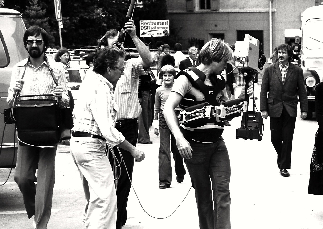 Utilisation d'une Steadicam pour le tournage du film "Le toreau des sables"